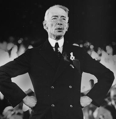 Le premier ministre du Québec Louis-Alexandre Taschereau entre 1920 et 1936; Quebec's premier Louis-Alexandre Taschereau, between 1920 and 1936.